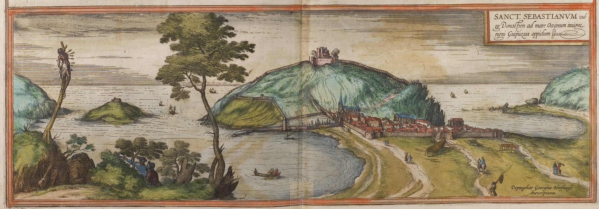 Donostia-San Sebastián